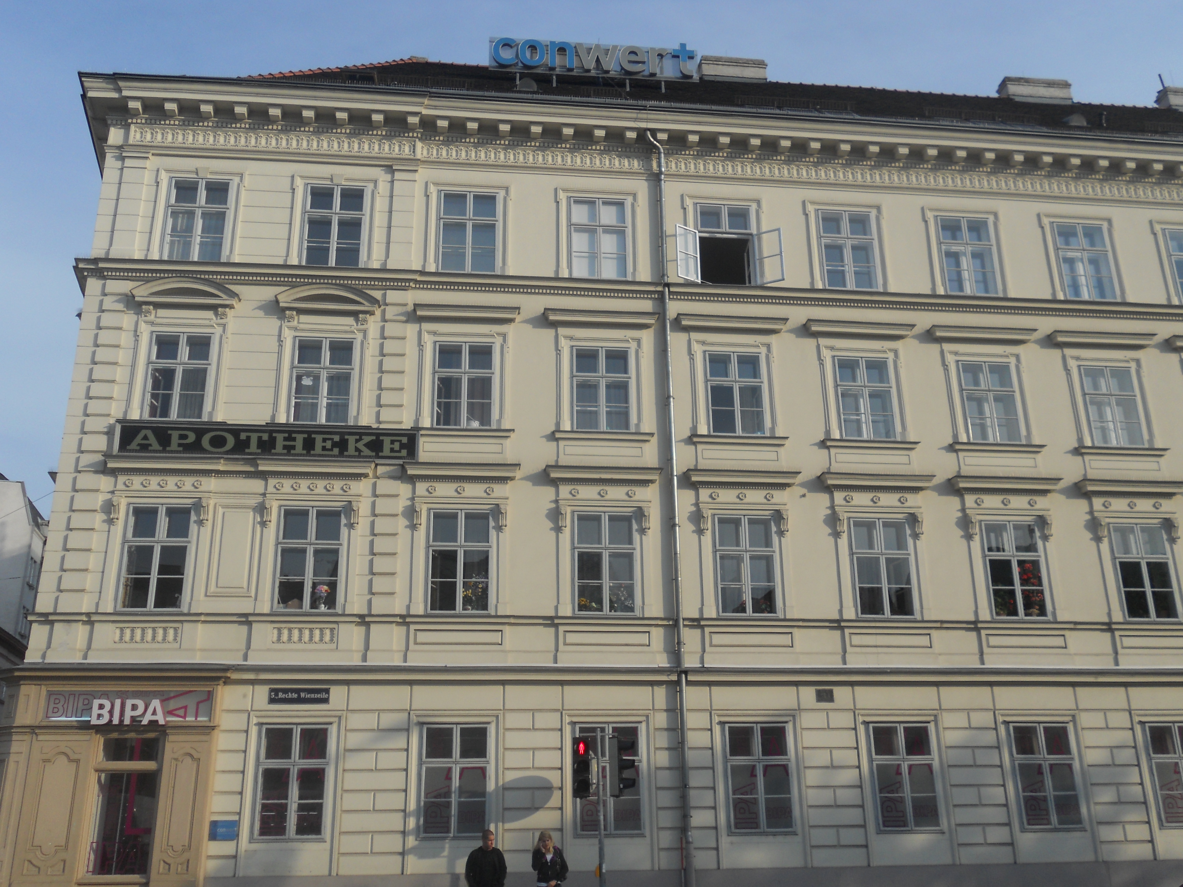 Haus Kettenbrückengasse 23, von der Rechten Wienzeile aus gesehen